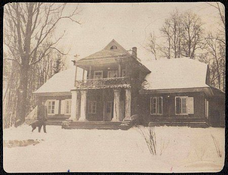 Сядзібна-паркавы ансамбль Скіндэраў у Міхайлоўшчыне